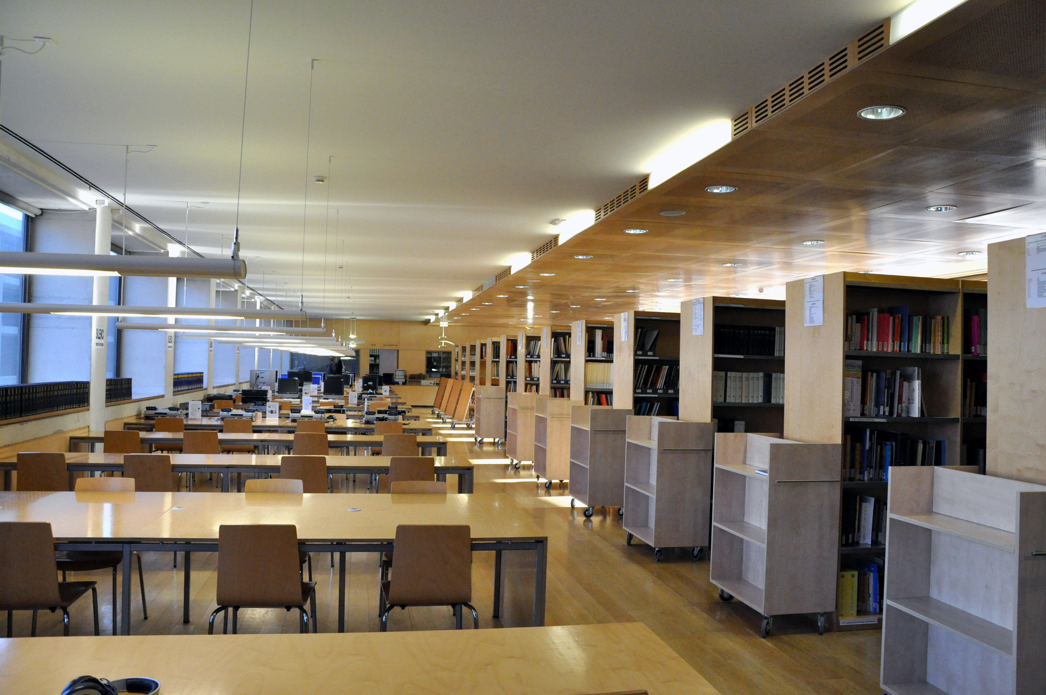 Escola Superior de Música de Catalunya Biblioteca Zona estudi